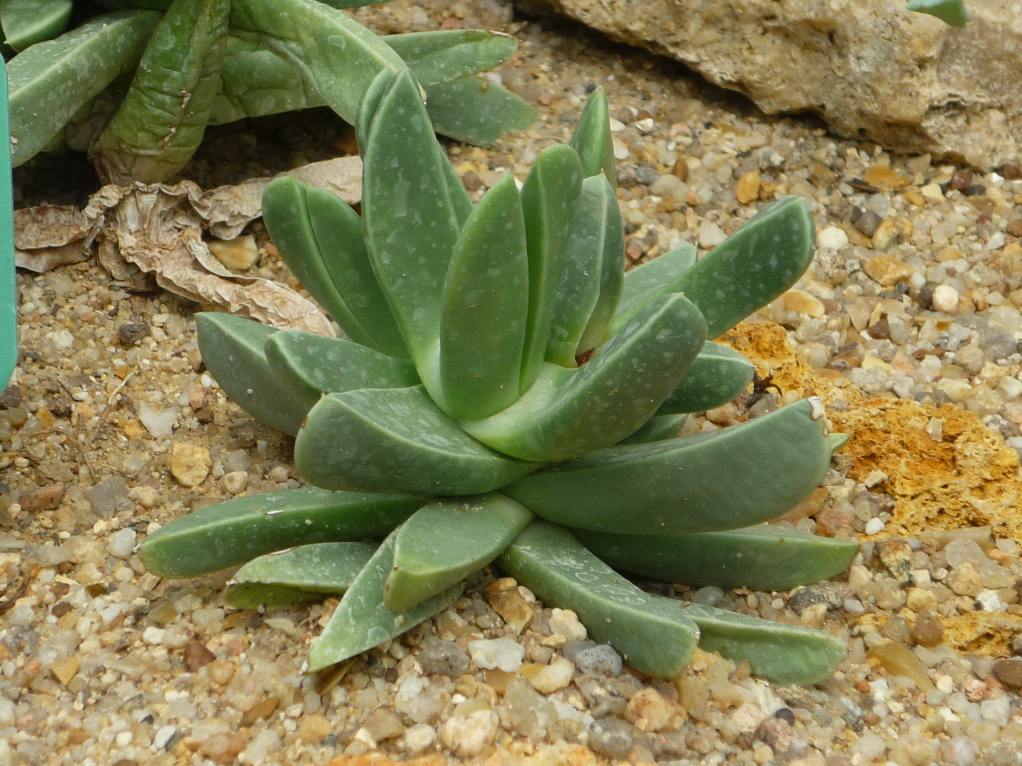 Machairophyllum stenopelatum, jardin des plantes de Paris, France